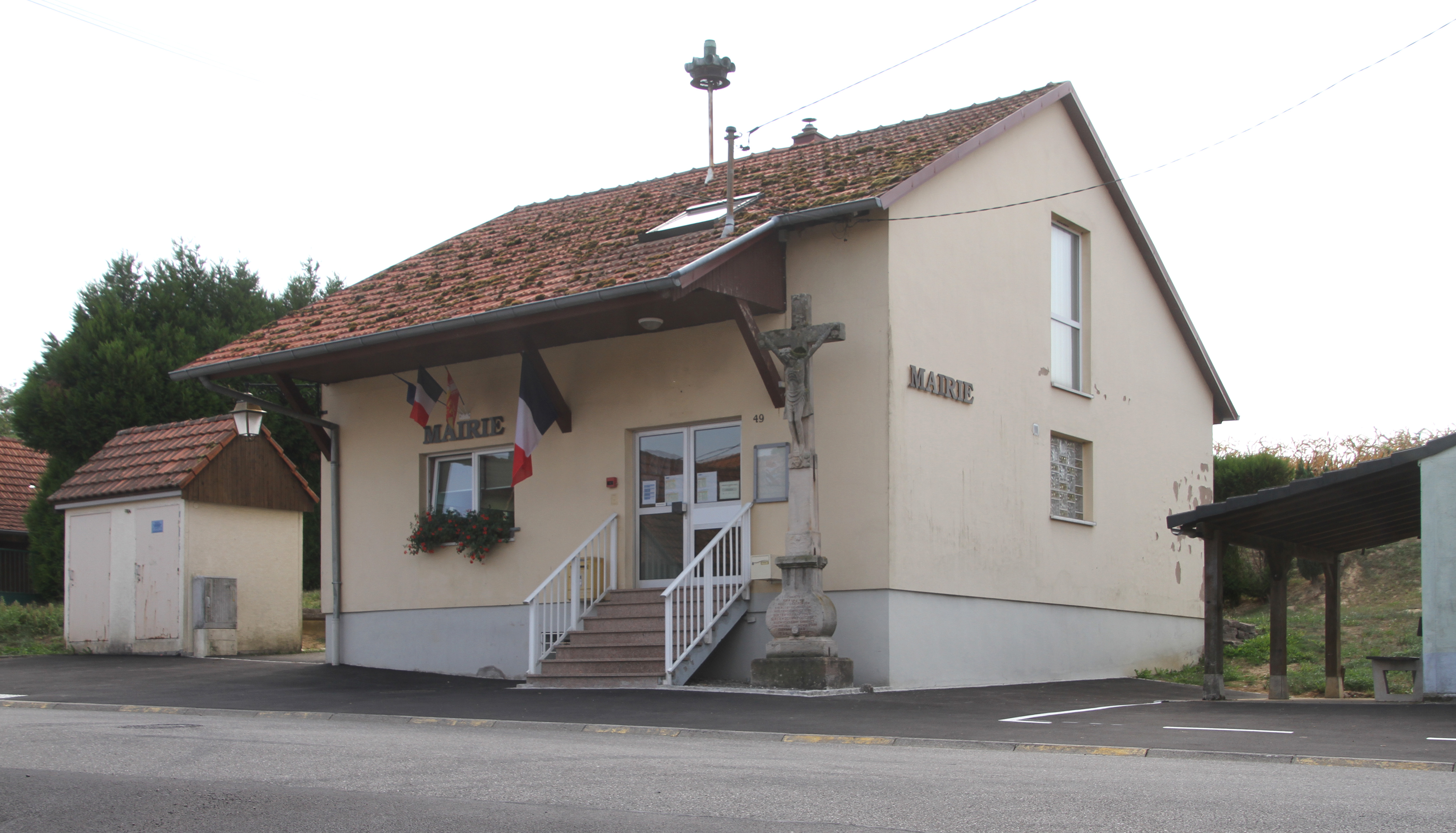 Eberbach-Seltz